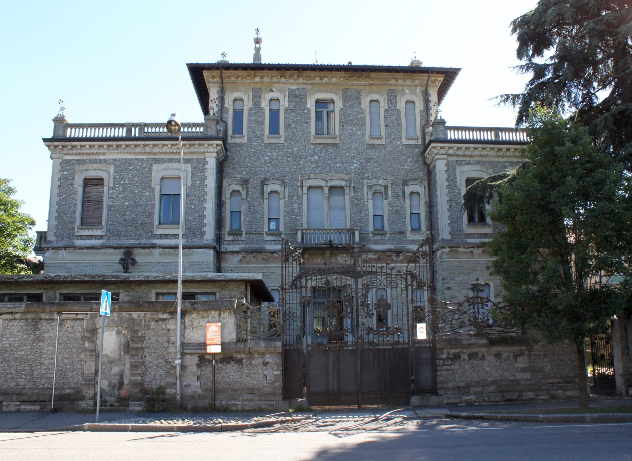 Villa Ottolini-Tovaglieri, lato Parco del Tessile This is a photo of a monument which is part of cultural heritage of Italy.